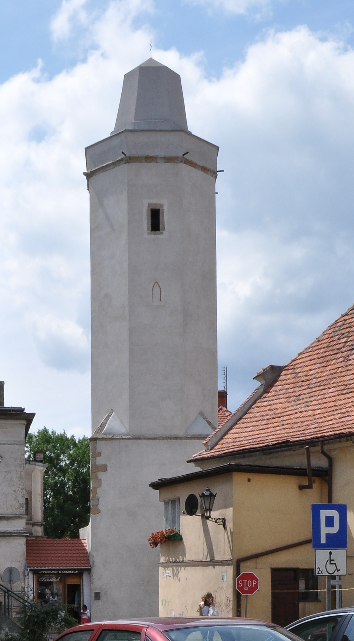 baszta strzegomska w zespole murów miejskich 02.1964.